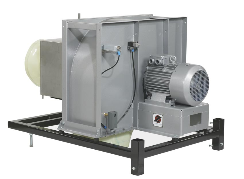 CO2 ventilator